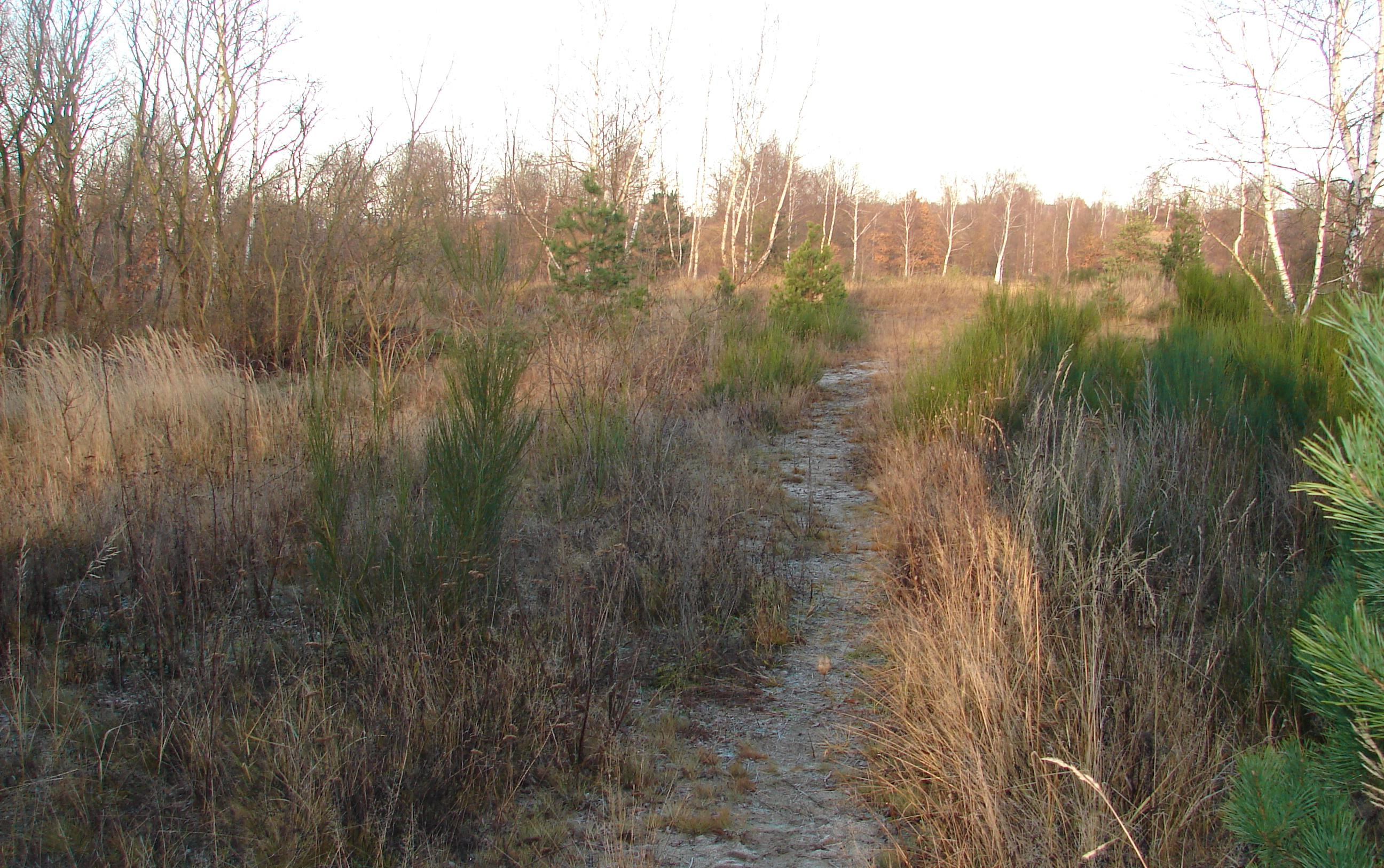 typische Vegetation des Dresdner Hellers - viele Birken, verstreute Kiefern, Buschwerk und hohe Gräser auf sandigem Untergrund